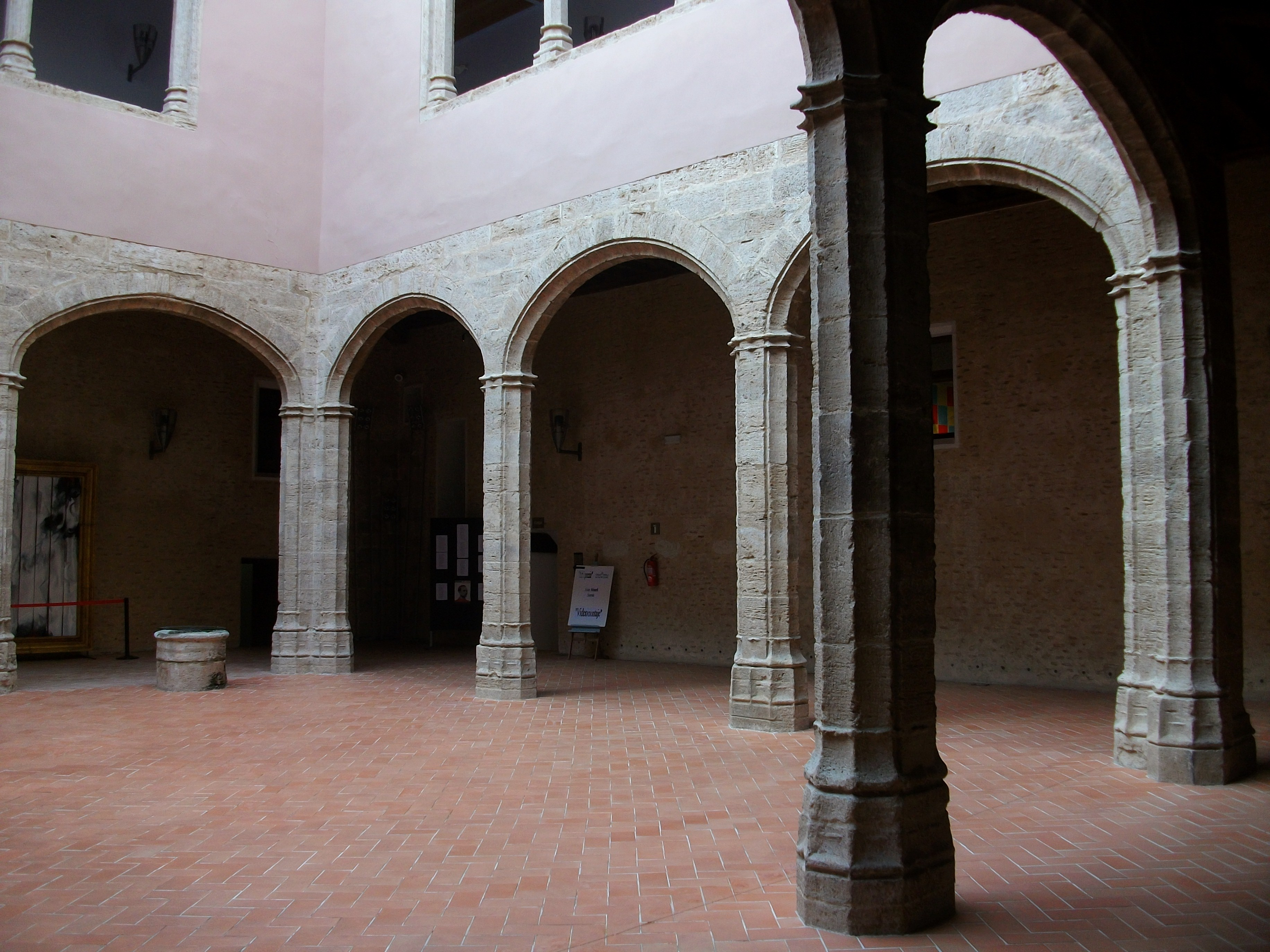 Pati del castell d'Alaquàs, País Valencià.